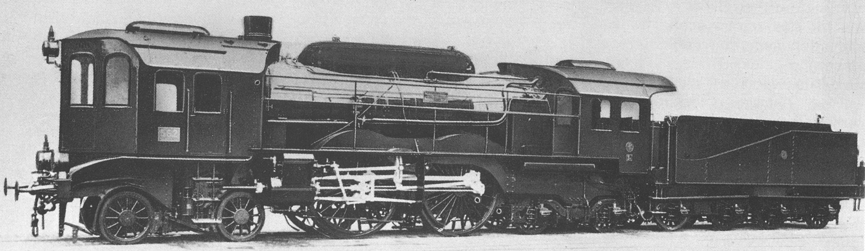 german steam engine Preußische S 9 (Versuch)